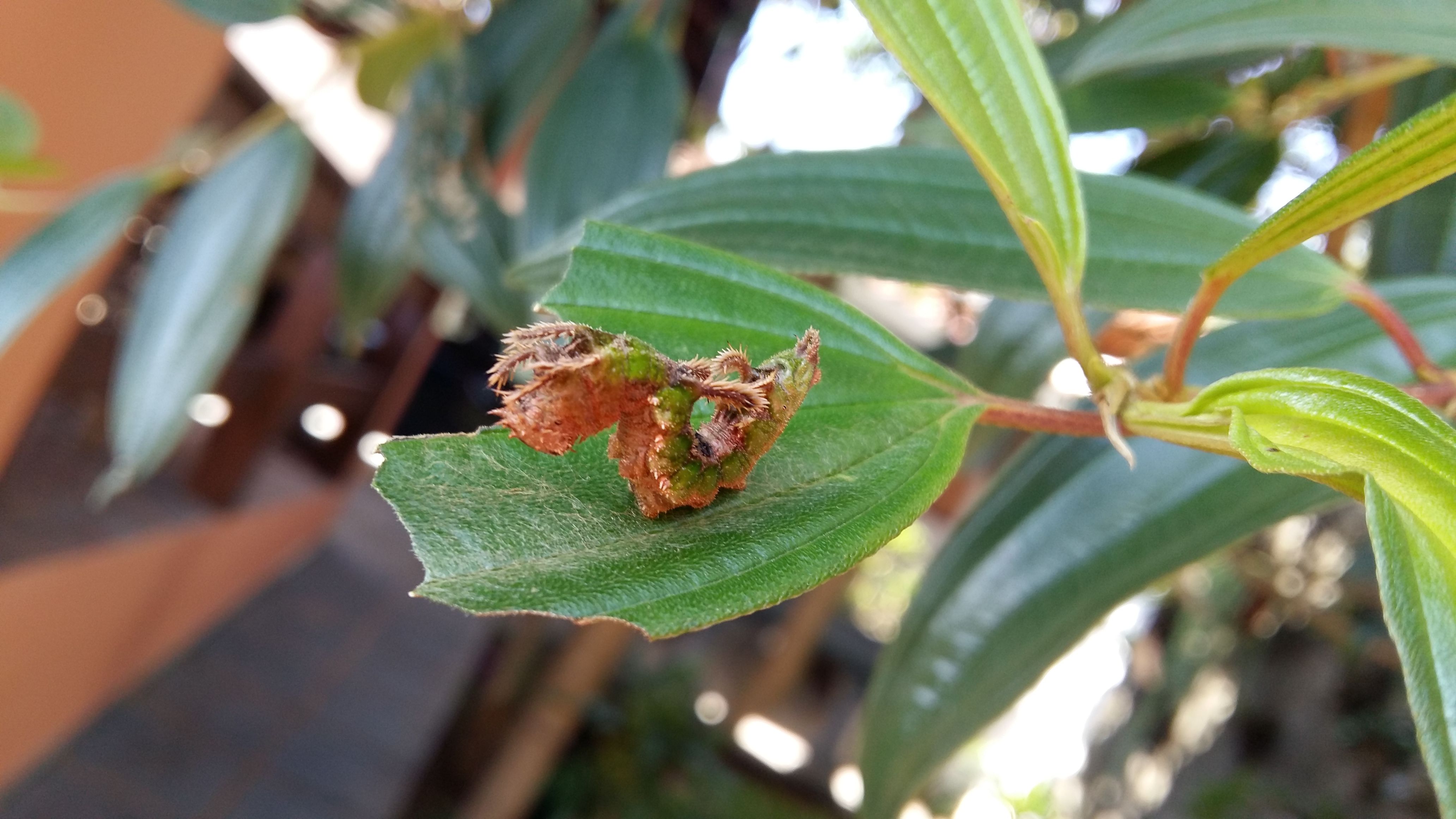 Foto tirada em Mairiporã-SP